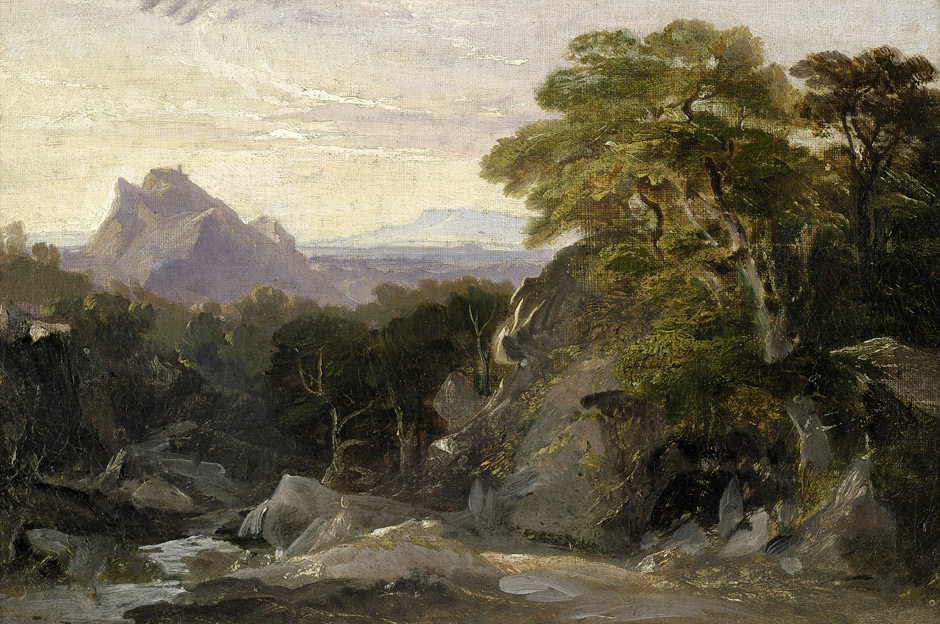 Friedrich Preller d. J.:: "Blick auf Civitella". Öl auf Leinwand auf Pappe aufgezogen. 30,5 x 21 cm. Um 1896.